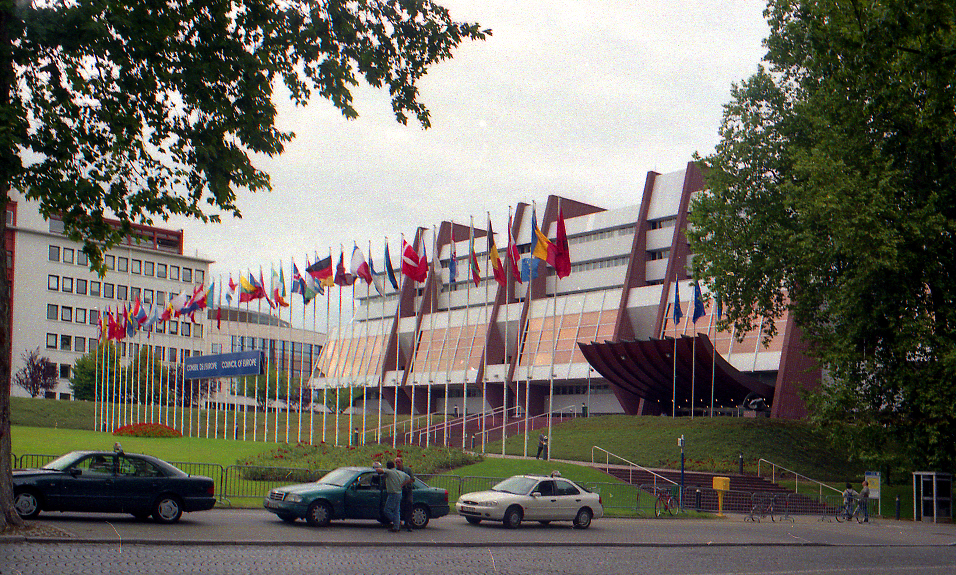 Страсбург. Здание Совета Европы